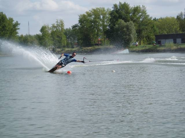 Photo d'un skieur nautique dans la discipline "Slalom" prise sur le lac de Fenouillet près de Toulouse